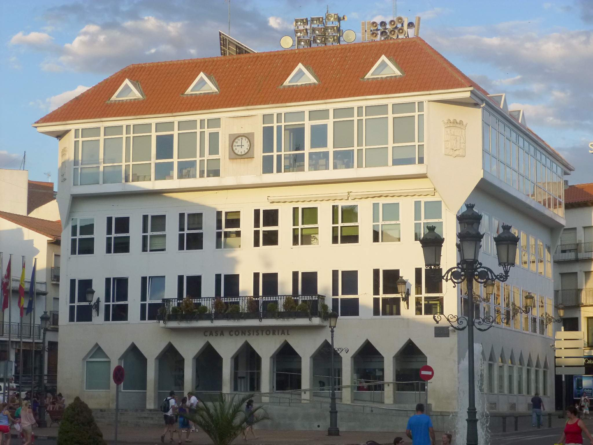 Arganda del Rey - Ayuntamiento